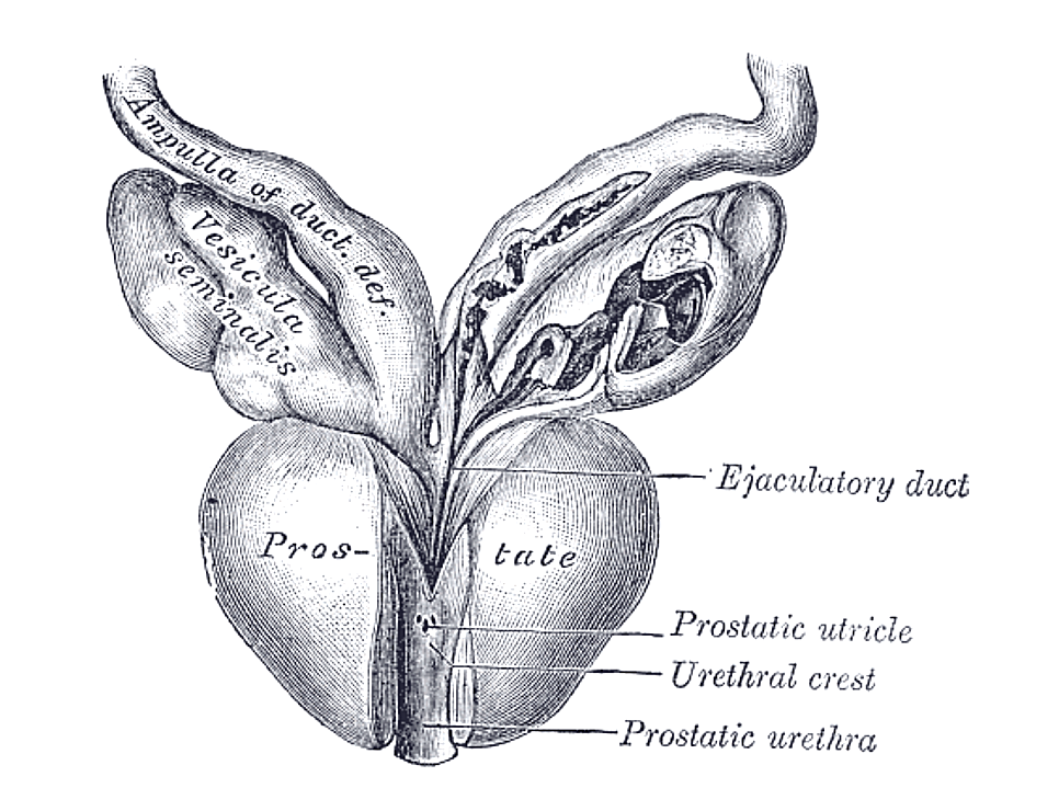 Prostate